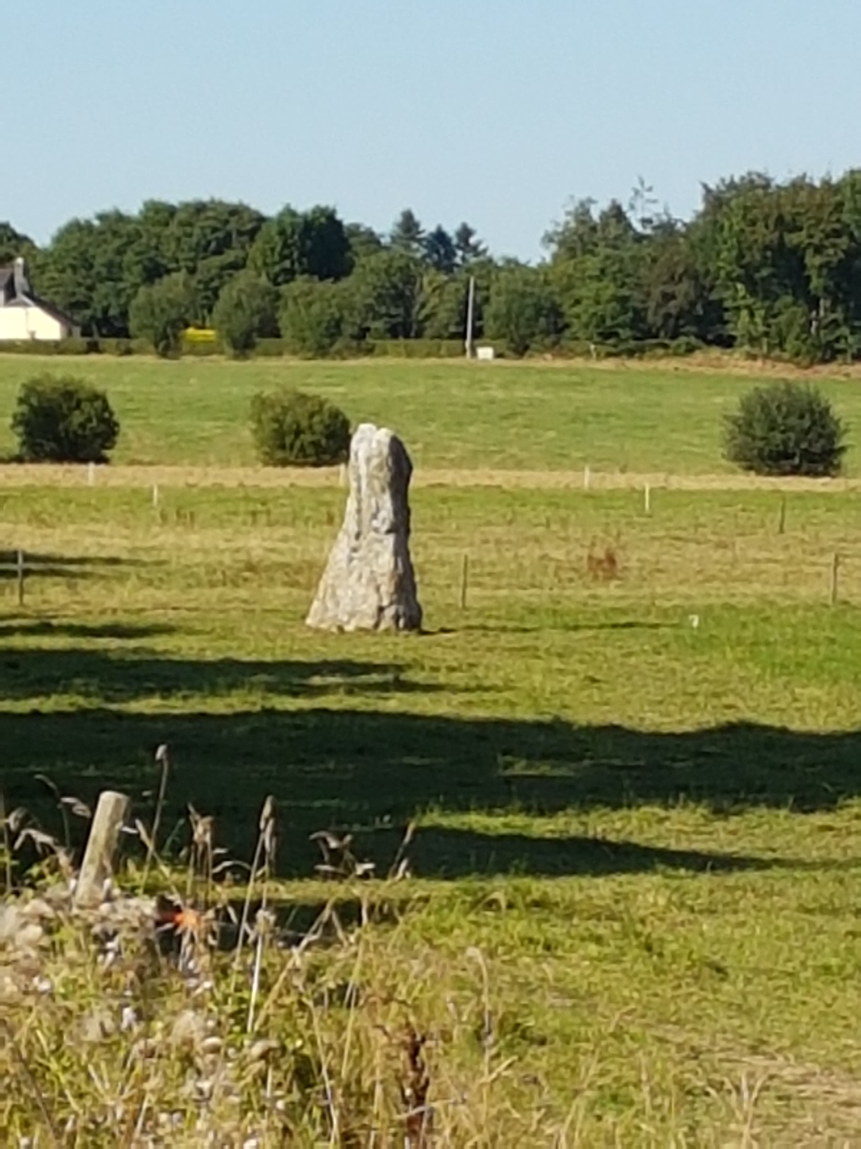 Menhir de Toul Hoat vu du sud , depuis le la route D54 au niveau de la ferme de Toul Hoat.